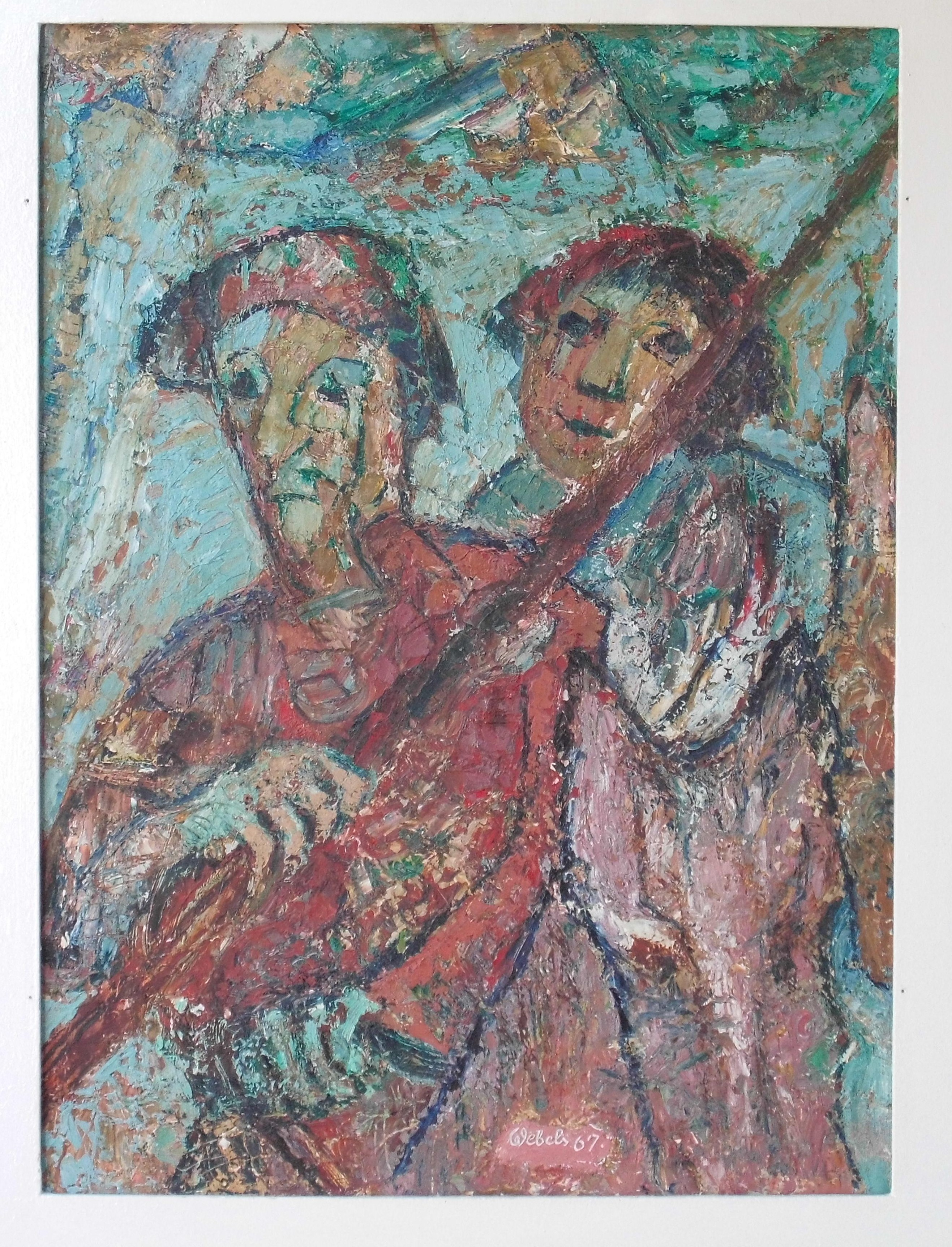 Acrylbild - Don Quichote und Sancho Pansa IV